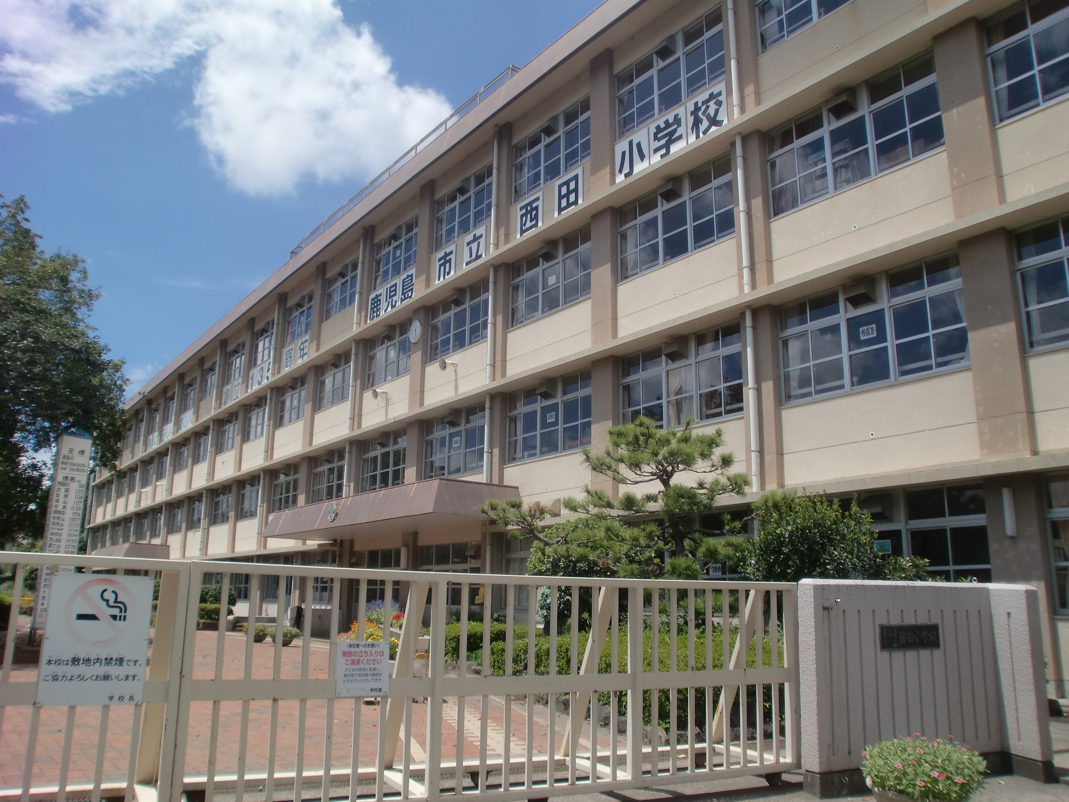 鹿児島市立西田小学校の外観。